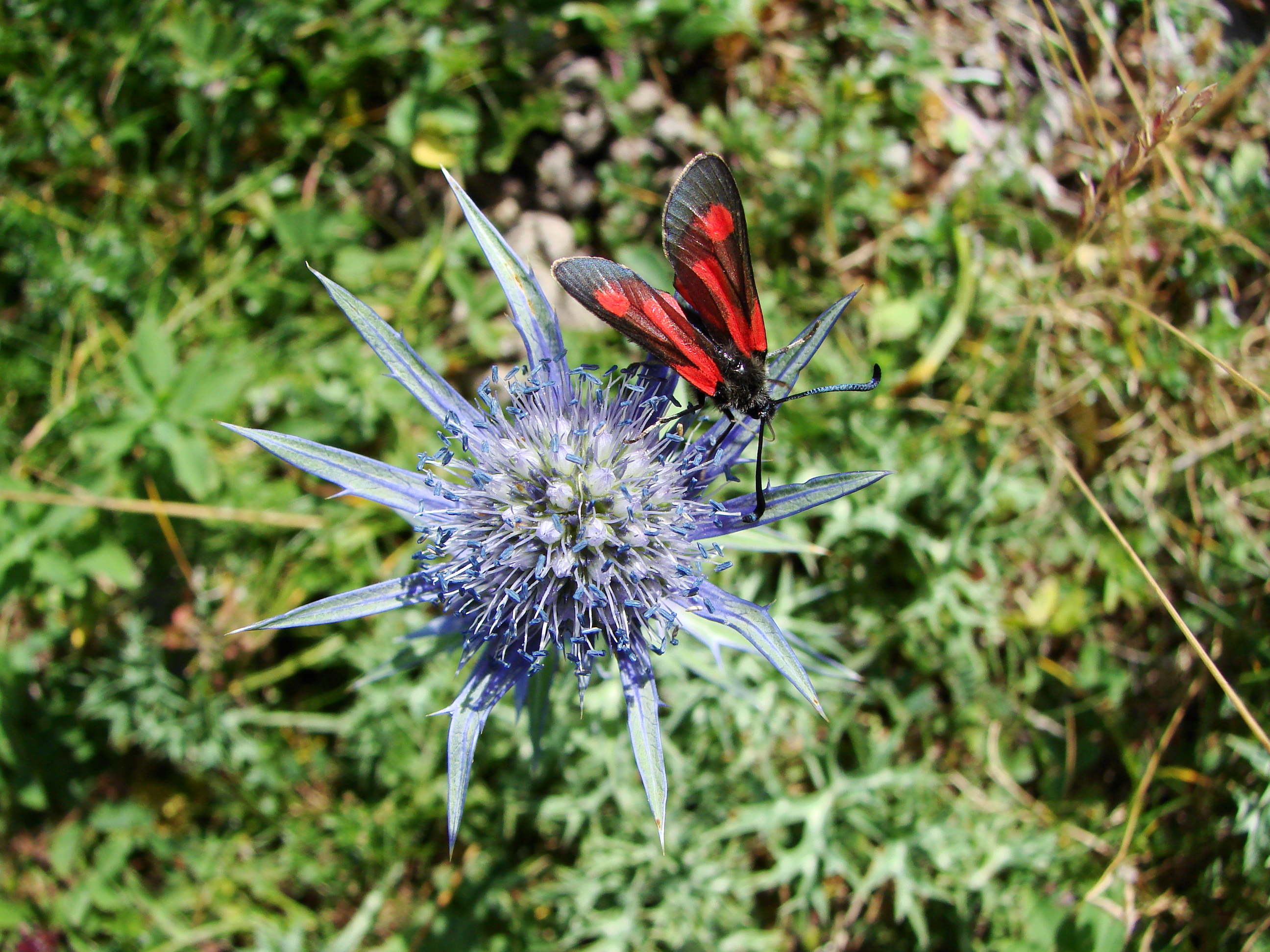 Vallée du Marcadau, Pyrénées françaises, commune de Cauterets, département des Hautes-Pyrénées (France) : Eryngium bourgatii pour la fleur, et probablement Zygaena contaminei pour le papillon.